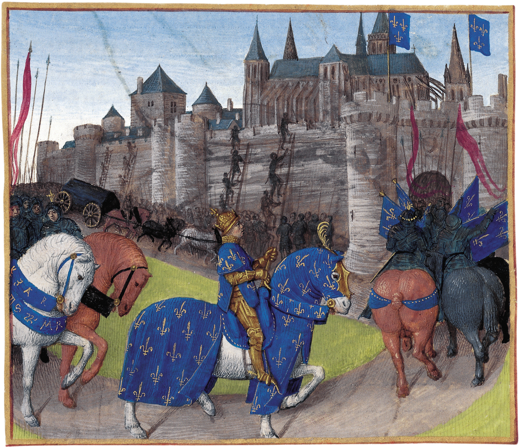 Prise de Tours en 1189 Grandes Chroniques de France, enluminées par Jean Fouquet, Tours, vers 1455-1460 Paris, BnF, département des Manuscrits, Français 6465, fol. 223 (Second Livre de Philippe Auguste) Lors de la campagne que le roi de France mène contre les Anglais, le 23 juin 1189, la ville de Tours est prise par l'armée de Philippe Auguste. Le roi et son cortège entrent dans la ville où flottent déjà les bannières fleurdelisées sur les deux tours qui défendent la porte. On aperçoit de façon très romanesque en arrière plan les fortifications, initialement édifiées au X° siècle, du bourg de Châteauneuf constitué autour de la basilique Saint-Martin de Tours (centre droit), dans lesquelles on devine le château de Tours à gauche (tel qu'il ne fut modifié qu'au 13° siècle !) alors que la réunion de ces deux parties de la ville, qui ne sont pas contigües, dans une même enceinte élargie n'est pas encore faite au moment de la victoire de 1189. Mais c'est par contre une réalité au moment de la réalisation de l'enluminure plus de 270 ans plus tard.